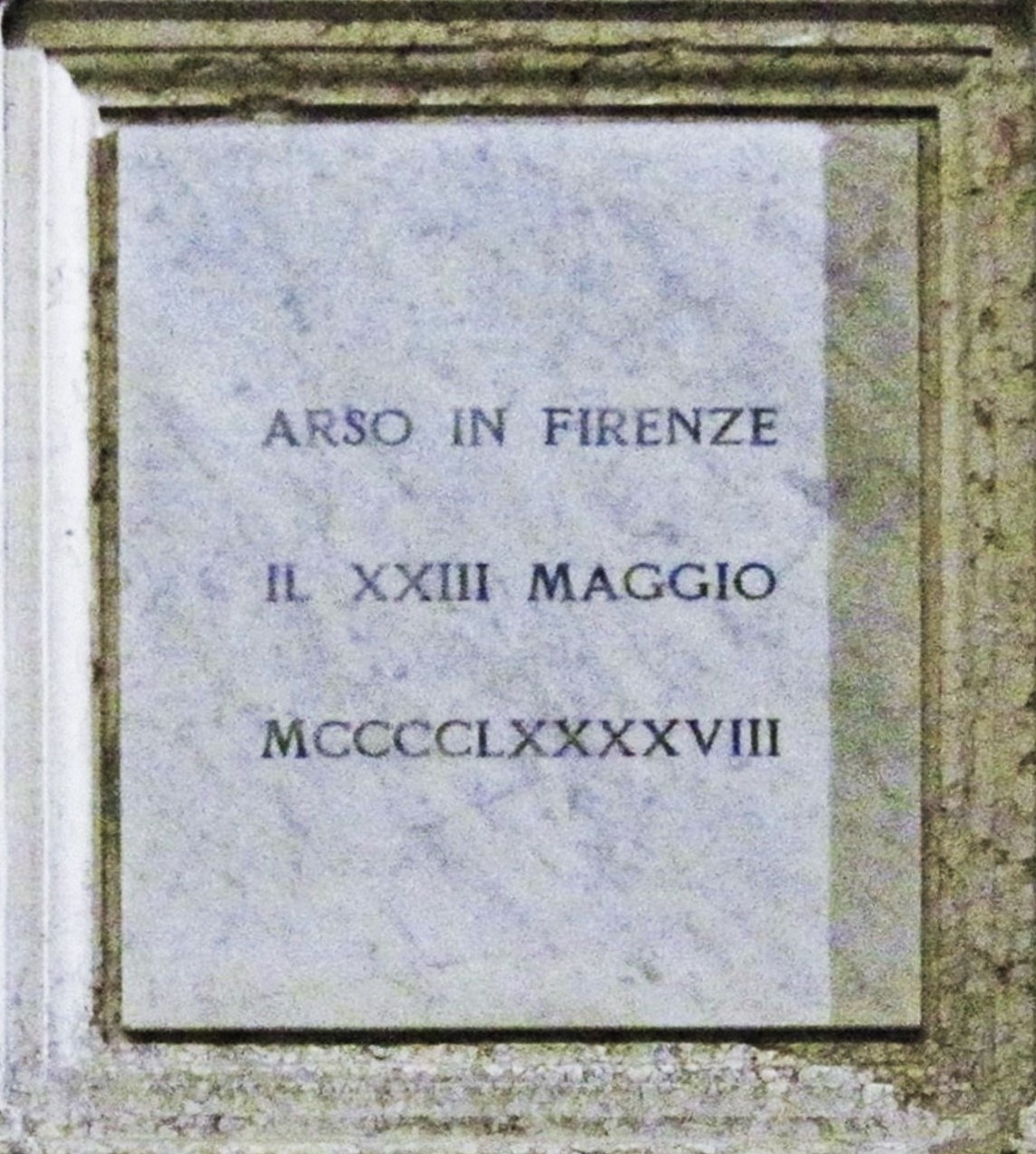 Epigrafe sulla parte posteriore della base del monumento